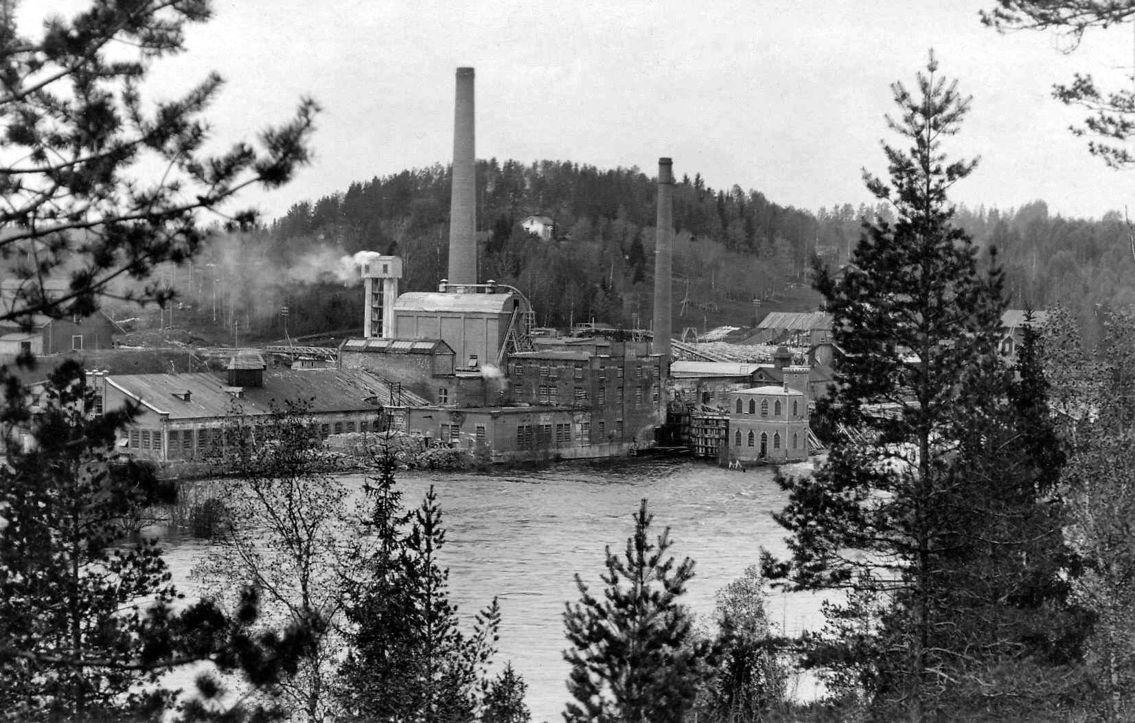 Завод Леппякоски, 1930-е годы